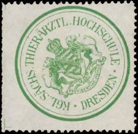 Sealing stamp Title: K.S. Thierärtzliche Hochschule (Tierarzt) Dresden Description: grün, weiß Place: Dresden size: 4x4 cm